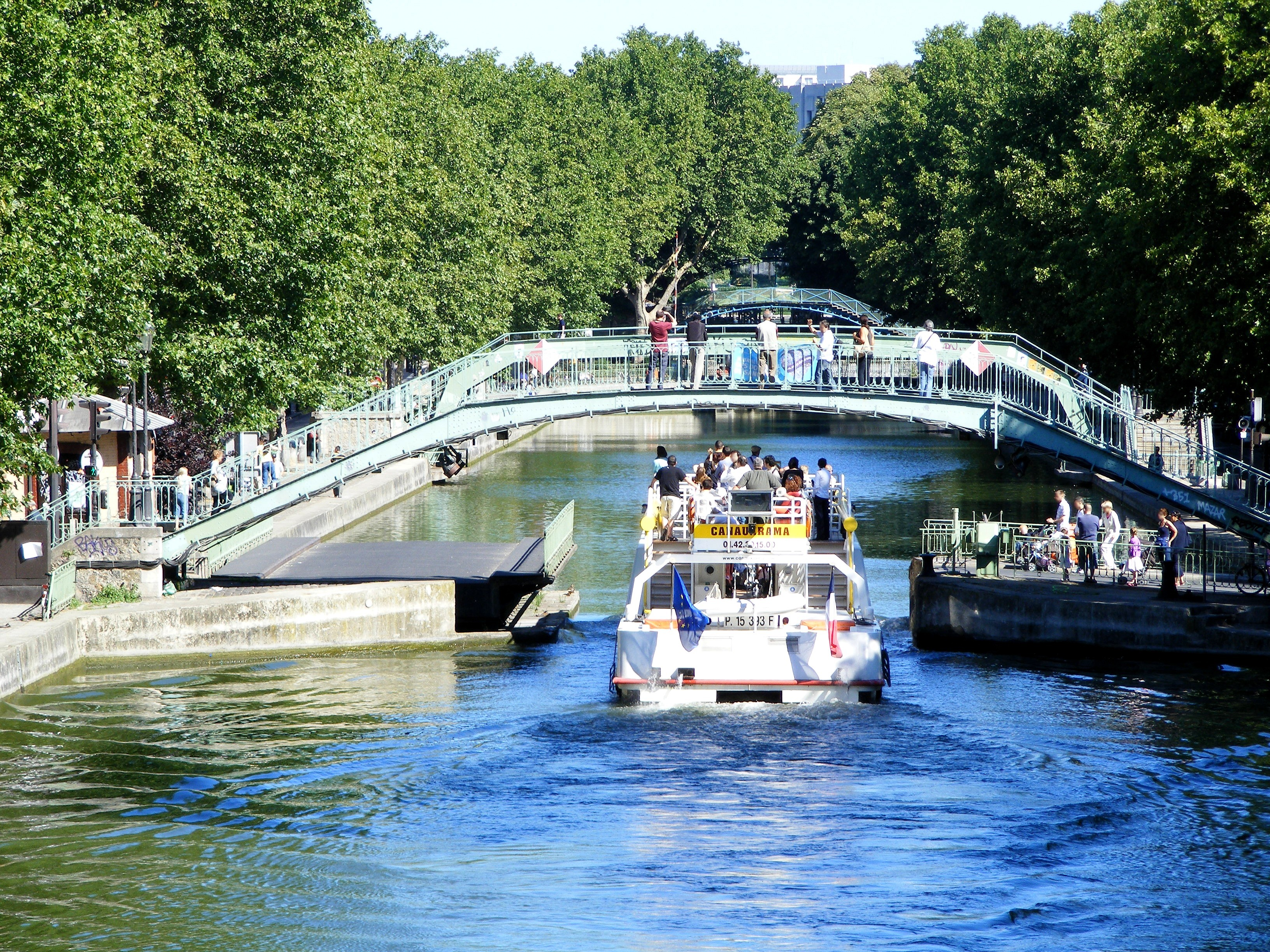 Canal Saint Martin à Paris, vue vers le Pont Dieu.